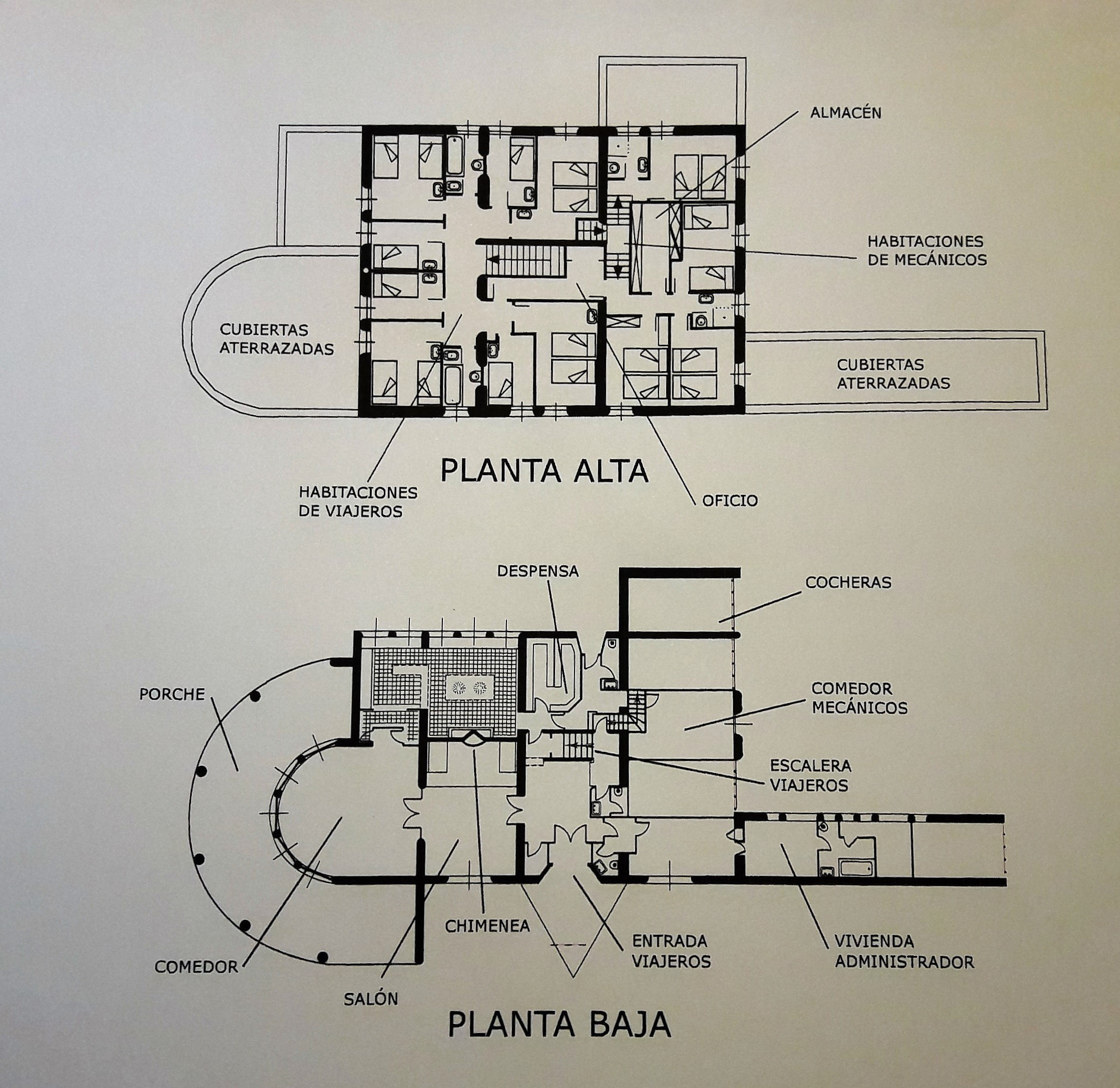 Plano de la disposición final que se llevó a cabo en distintos puntos de la geografía española.